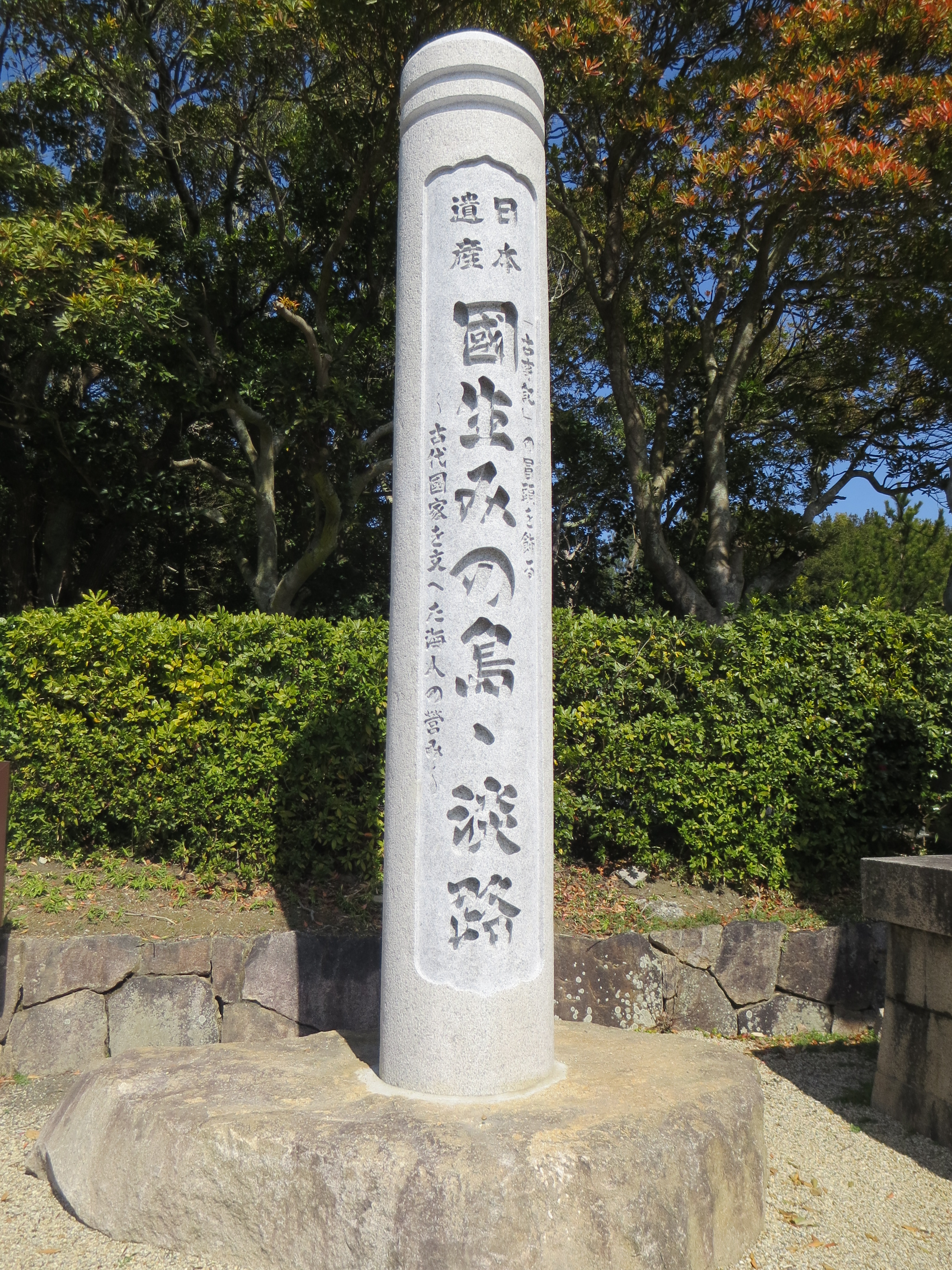 中文（香港）: 日本遺產的紀念碑。